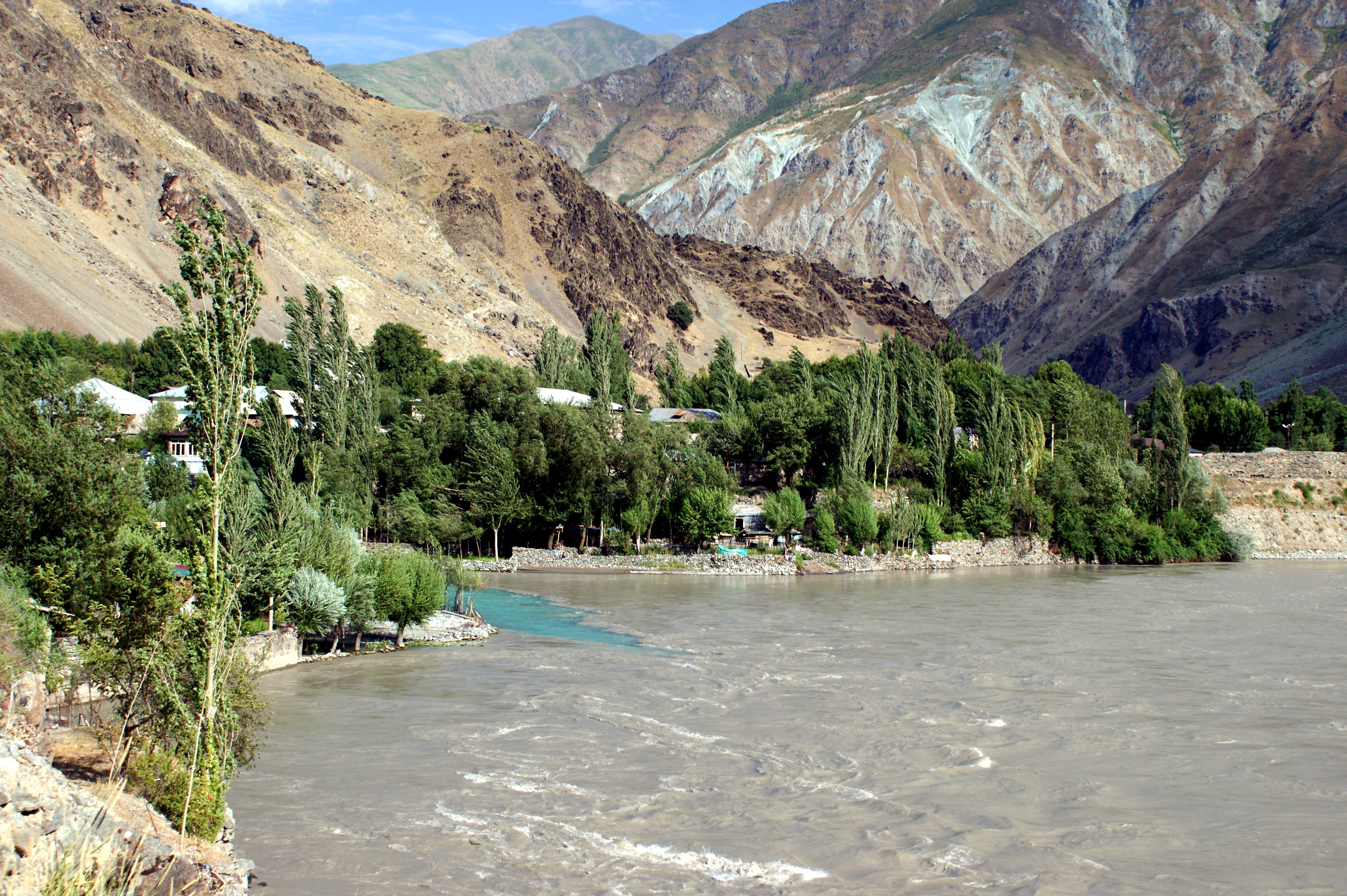 Mündung des Khumb in den Panj Тоҷикӣ: Хумбоб & Панҷ